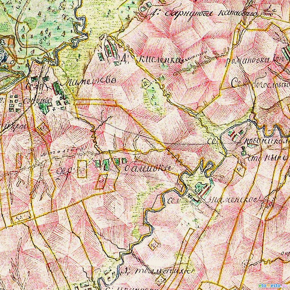 Карта Балеевки 1808 год.